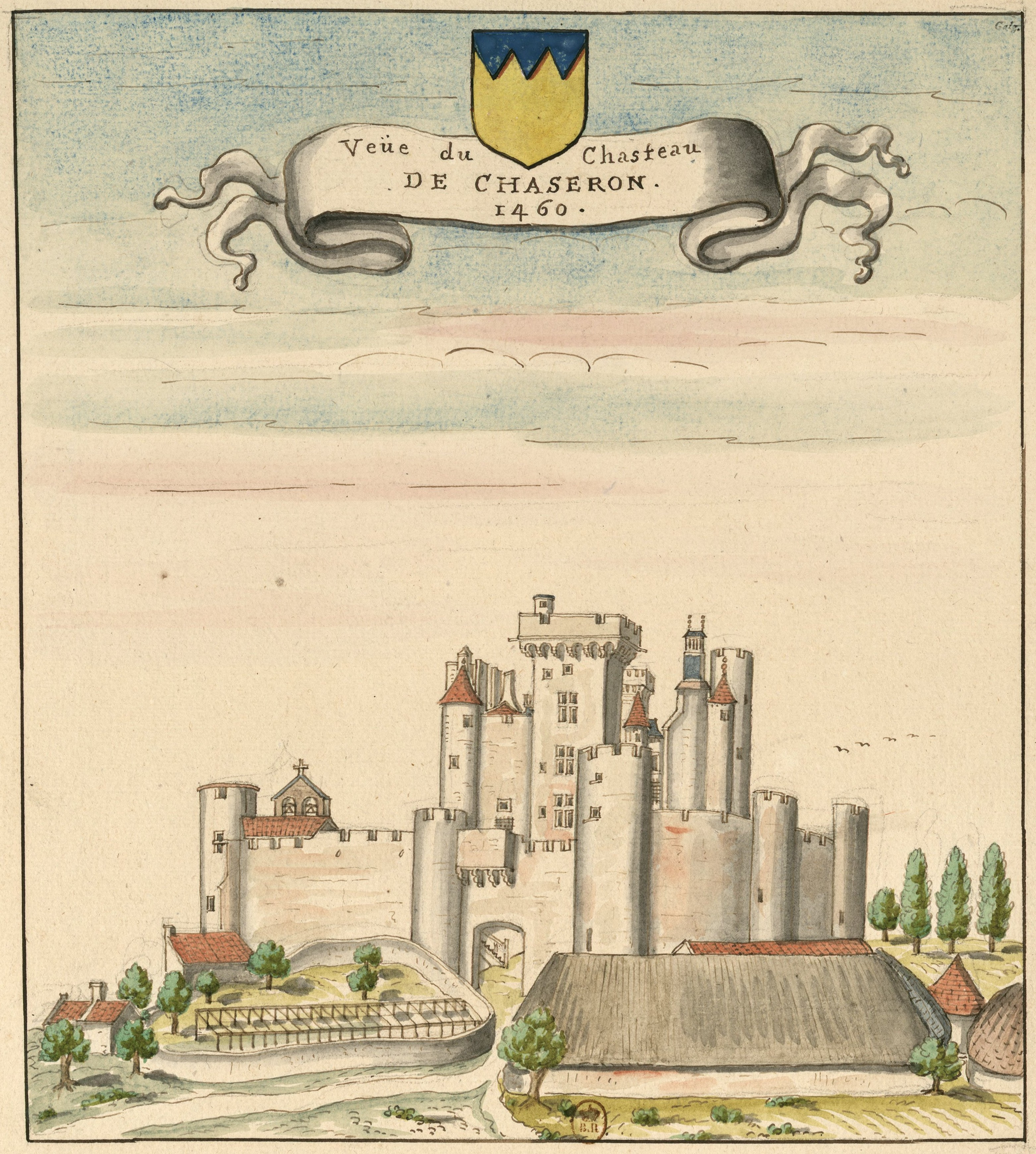 Dessin du château de Chazeron (vers 1460) relevé dans Guillaume Revel, L'armorial d'Auvergne, Bourbonois et Forestz.